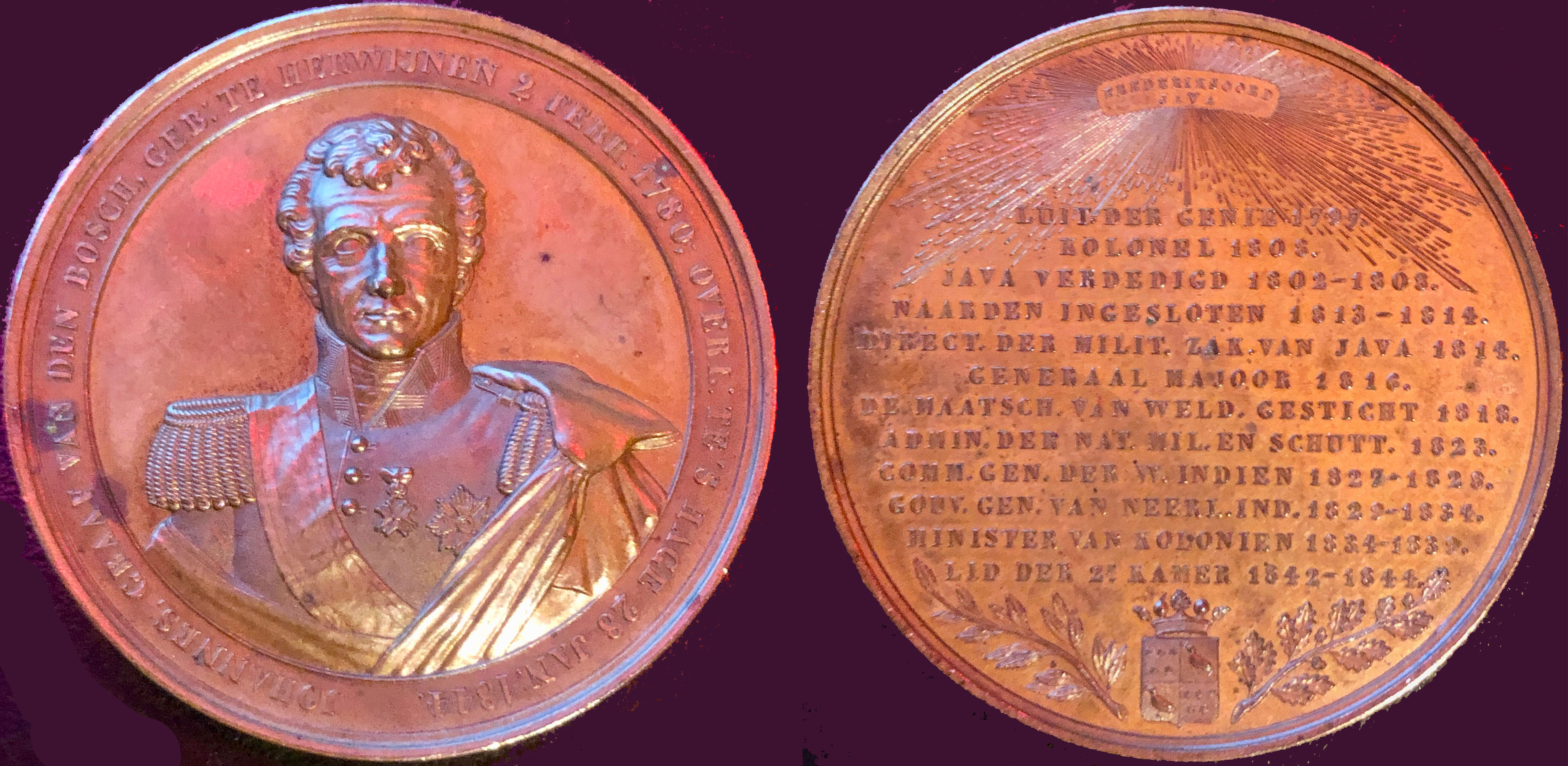 foto van een herdenkingspenning geslagen in 1845 na het overlijden van Johannes van den Bosch (1780-1844), ontworpen door Johannes Petrus Schouberg (1798-1864)